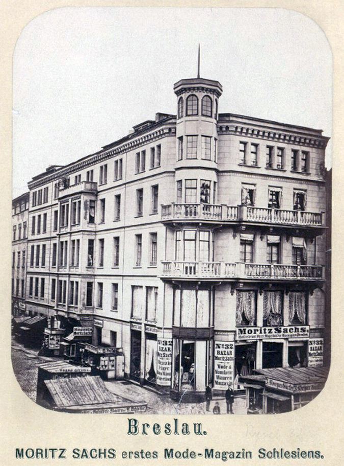 Dom Handlowy Moritza Sachsa z 1900, Rynek 32 Wrocłąw